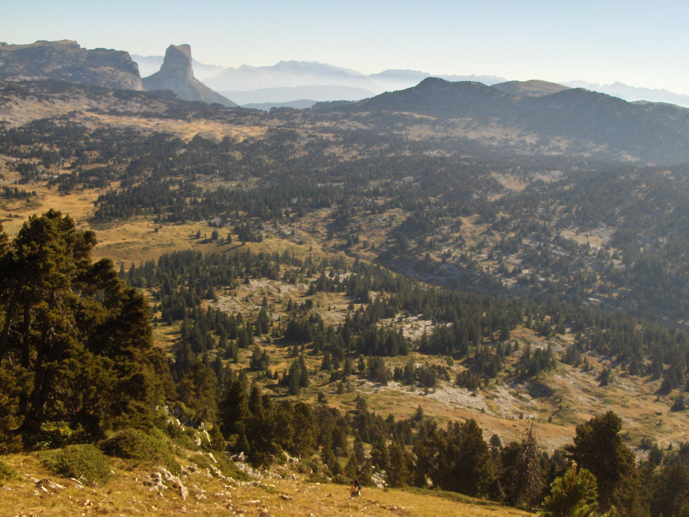 Photographie prise juste avant la montée sur la montagne du Glandasse. Au loin apparaît le Mont aiguille.